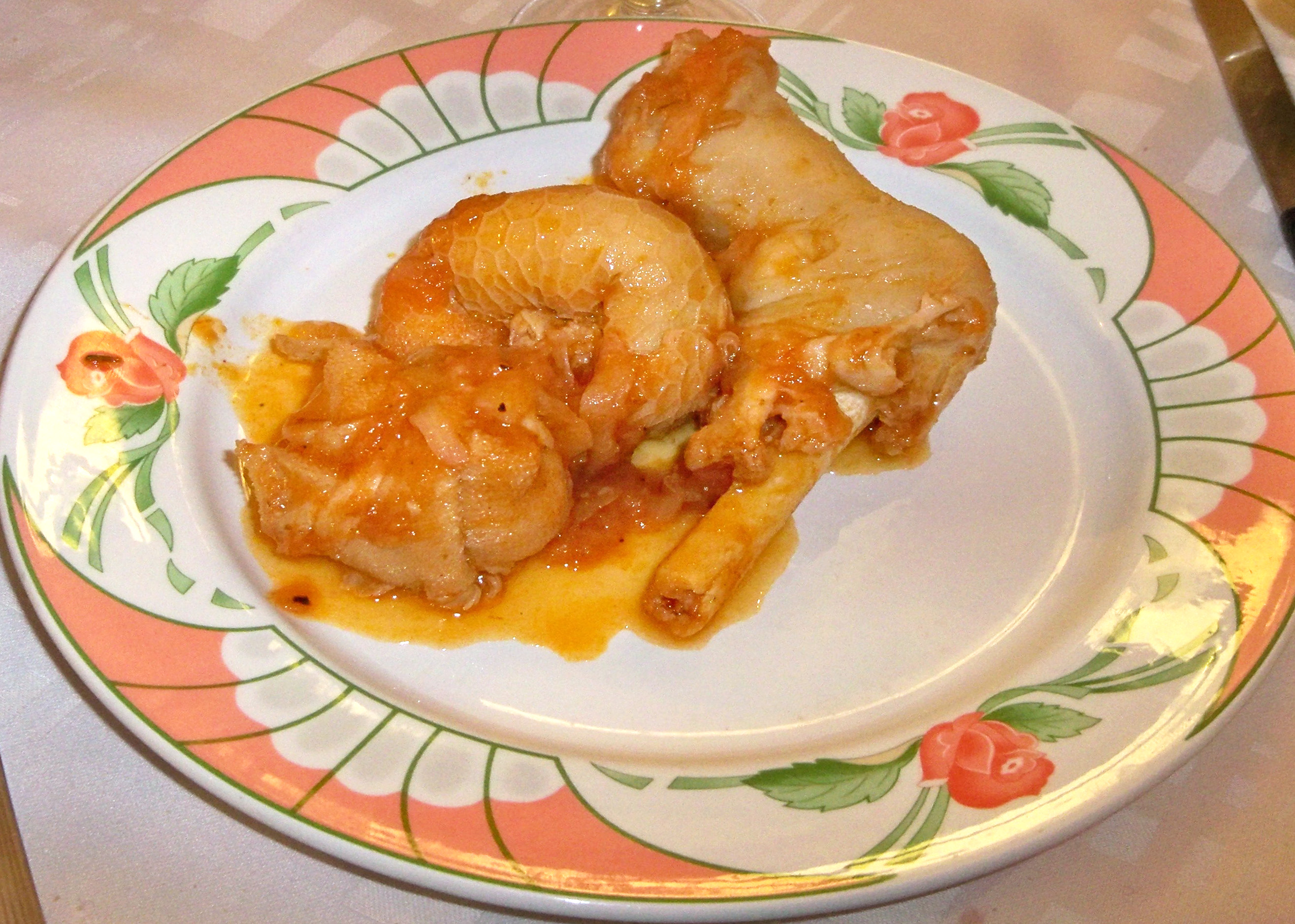 Pieds et Paquets, spécialité de Sisteron (04)